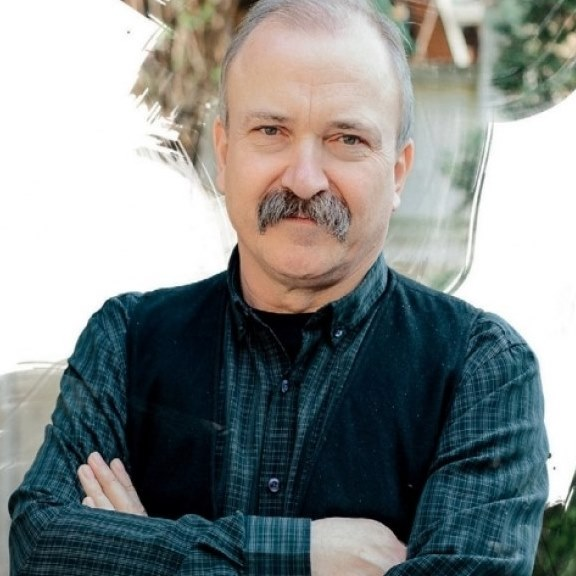 Balázs Bécsi Attila, a Téka Alapítvány elnöke